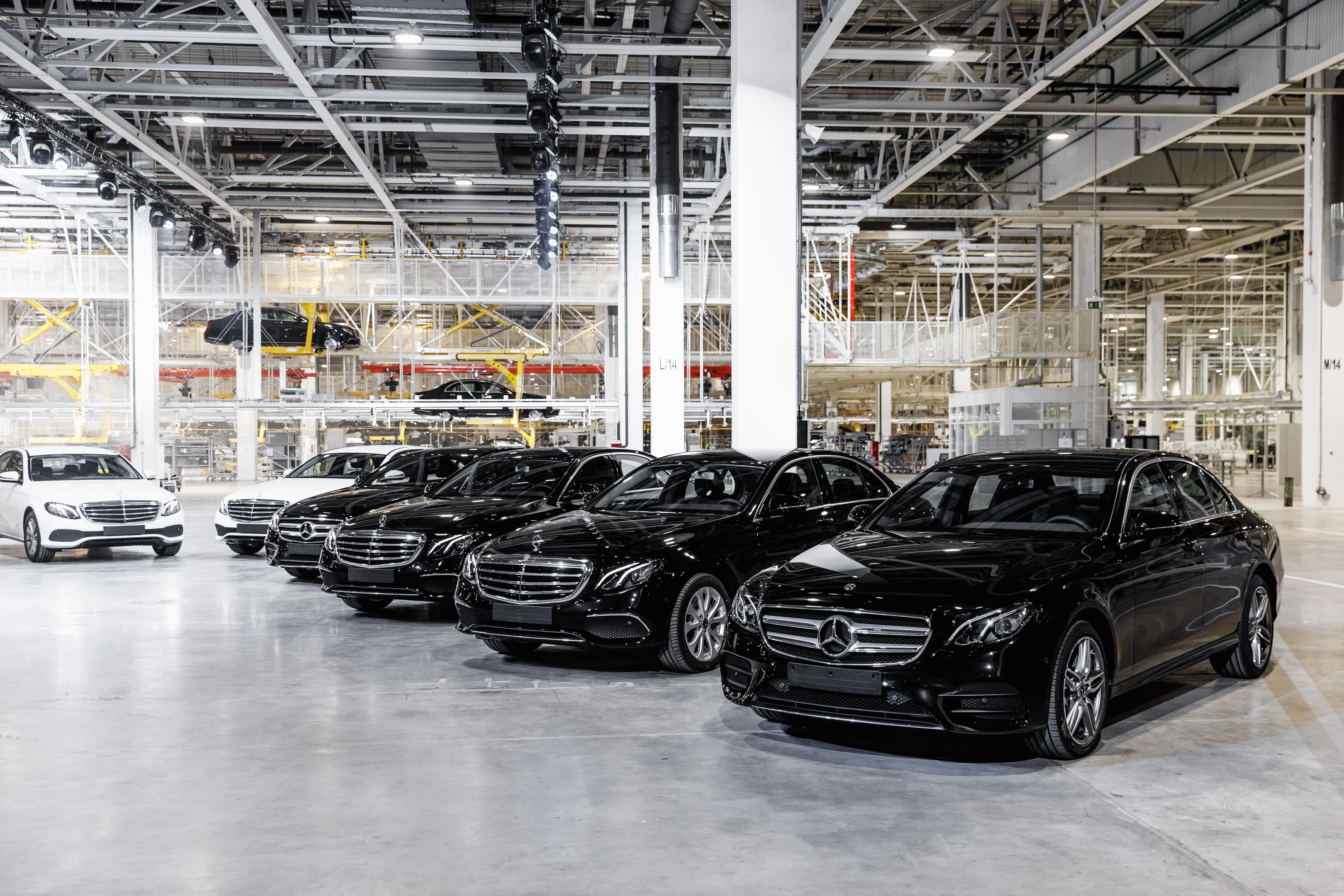 Модельный ряд автомобилей, выпускаемых на предприятии